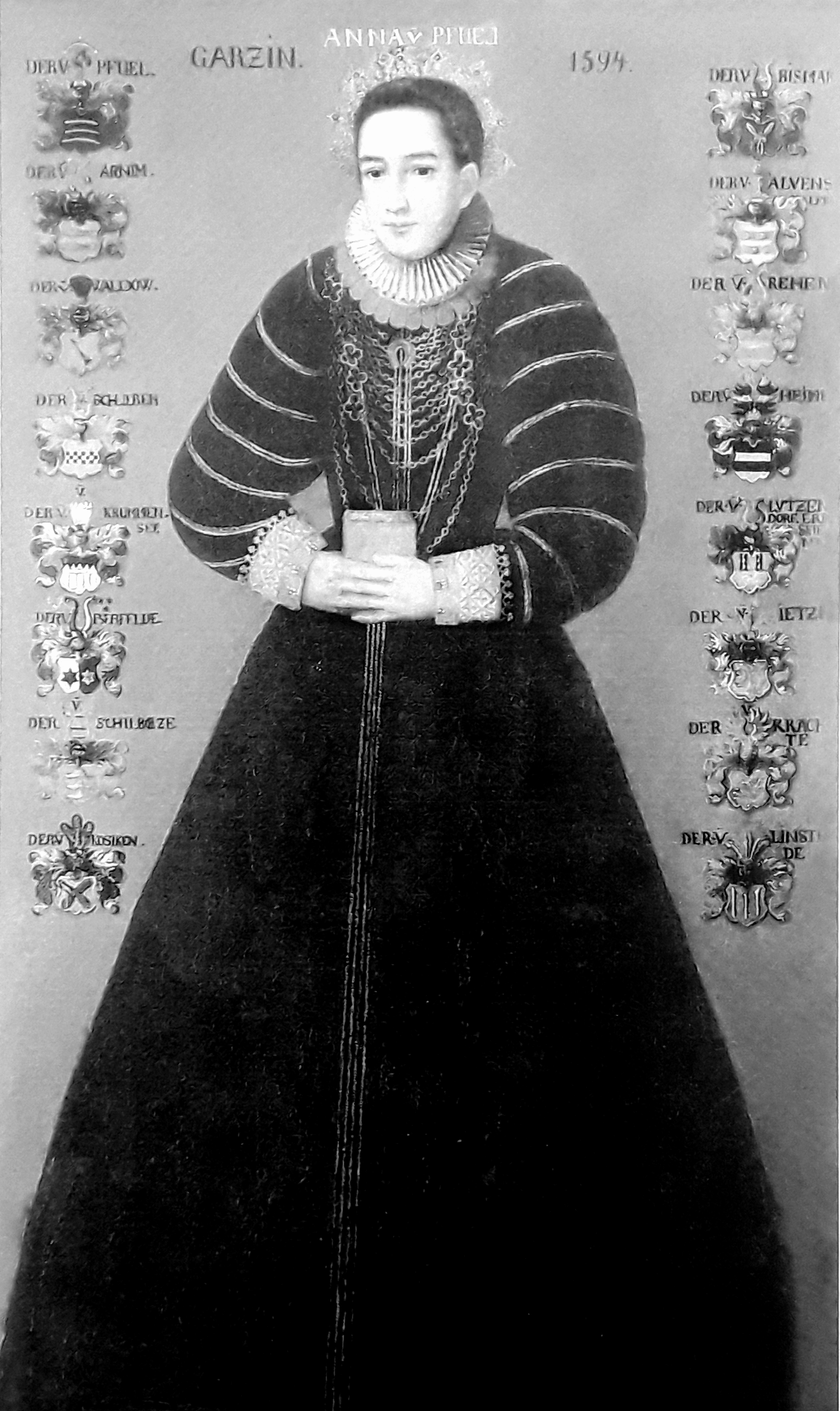 Bildnis der Anna von Pfuel, Öl auf Holz (1566), einst in der Eingangshalle Schloss Jahnsfelde